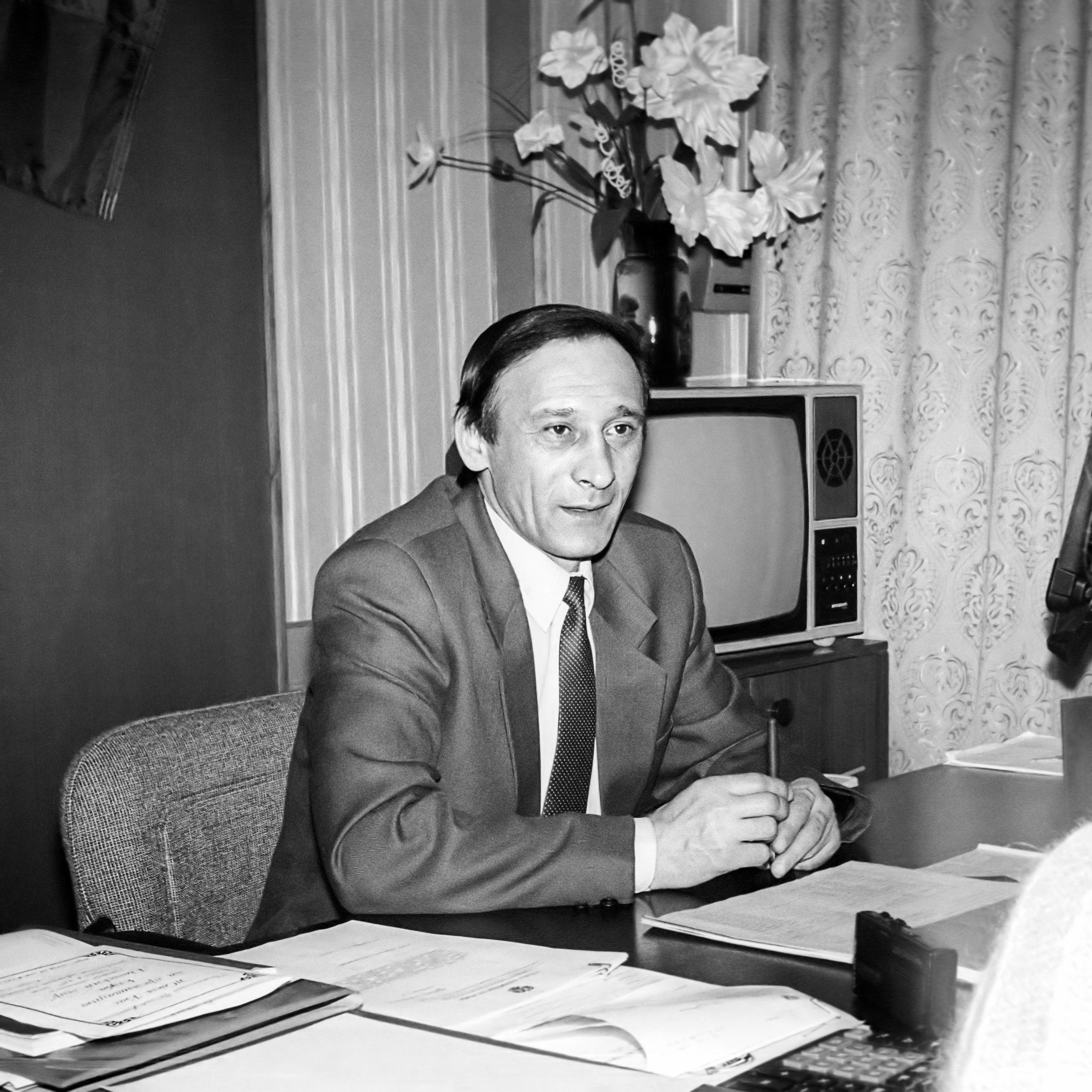 Мэр Переславля-Залесского Евгений Алексеевич Мельник даёт первое интервью в своей должности. Интервью опубликовано в газете «Коммунар» 8 марта 1996 года.